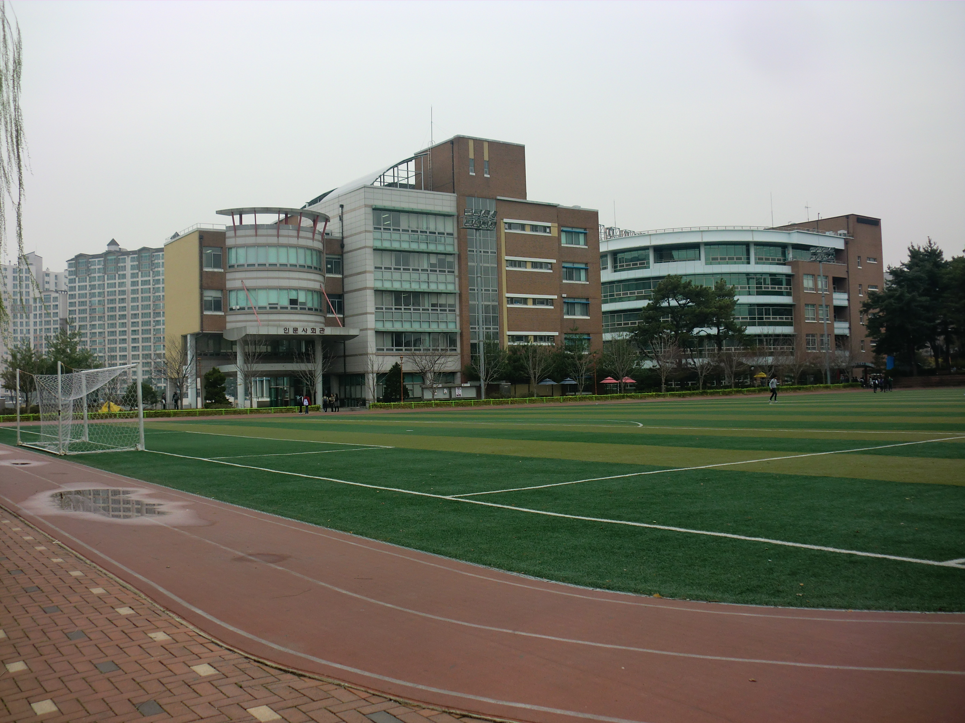 한경대학교 인문사회관